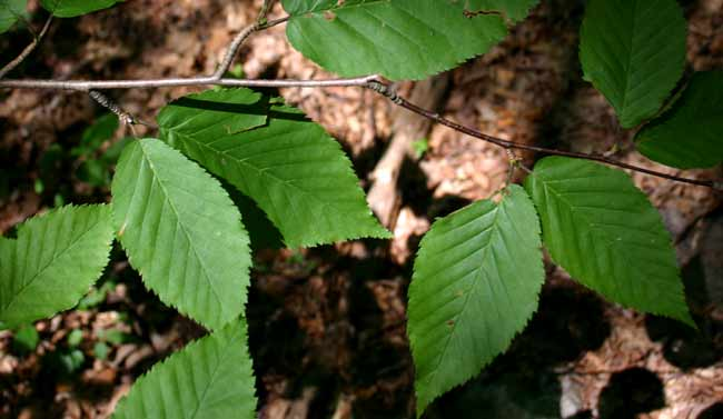 Betula alleghaniensis, River Birch.